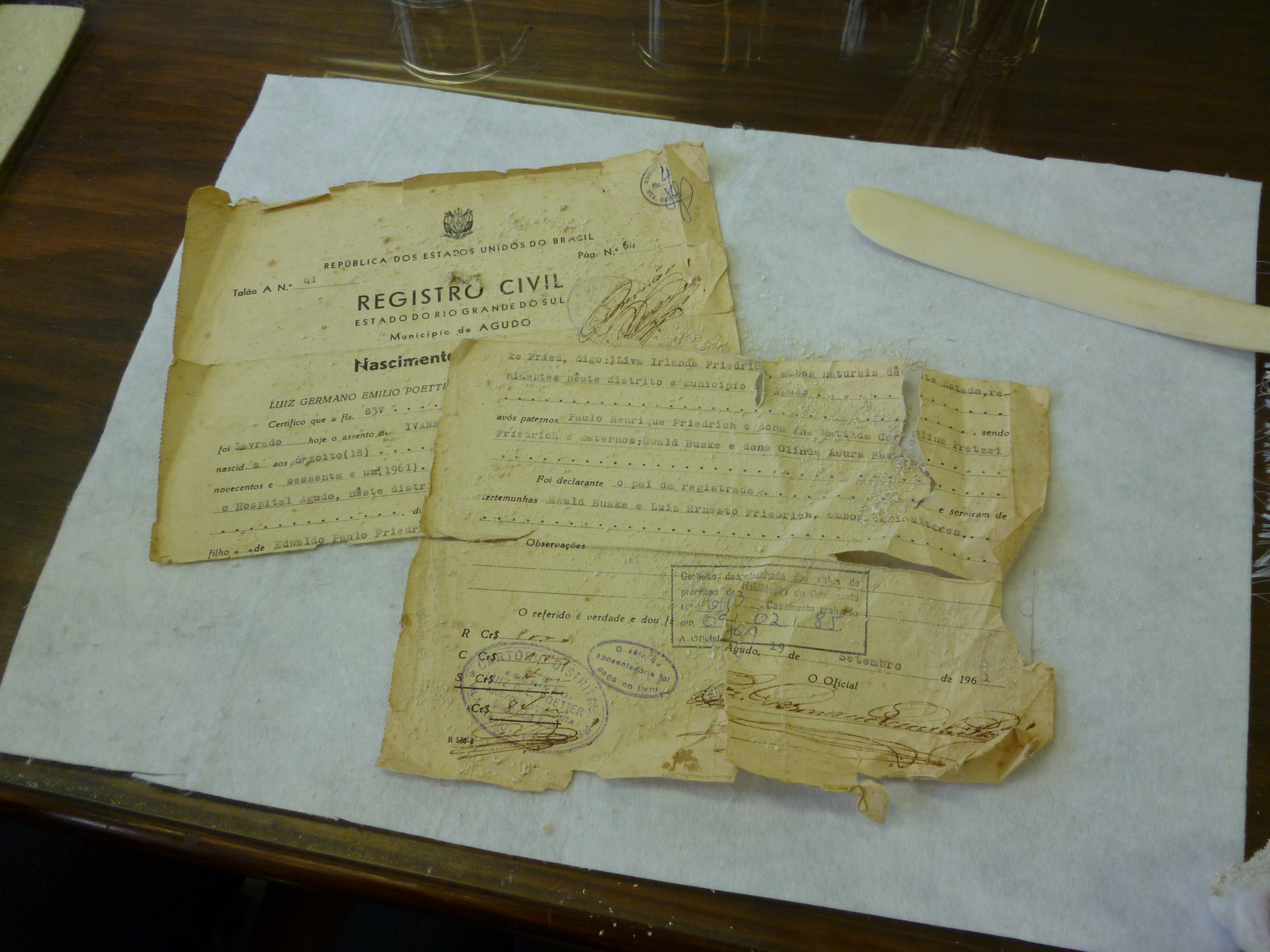 Documento antes de ser restaurado